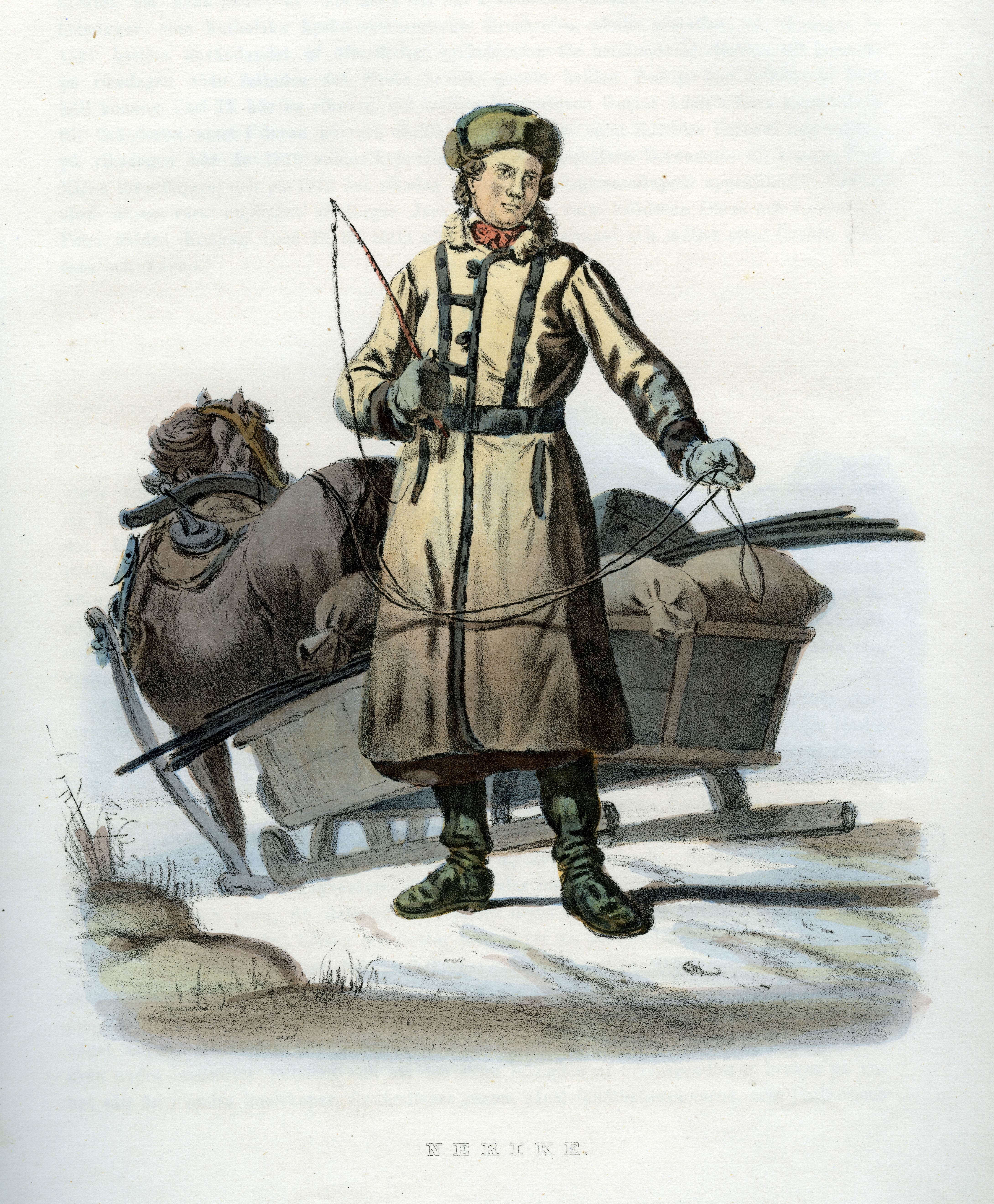 Folkdräkt från Närke, Sverige. Plansch ur Svenska folkets seder, bruk och klädedrägter (1863) tecknad av Carl Anders Dahlström.